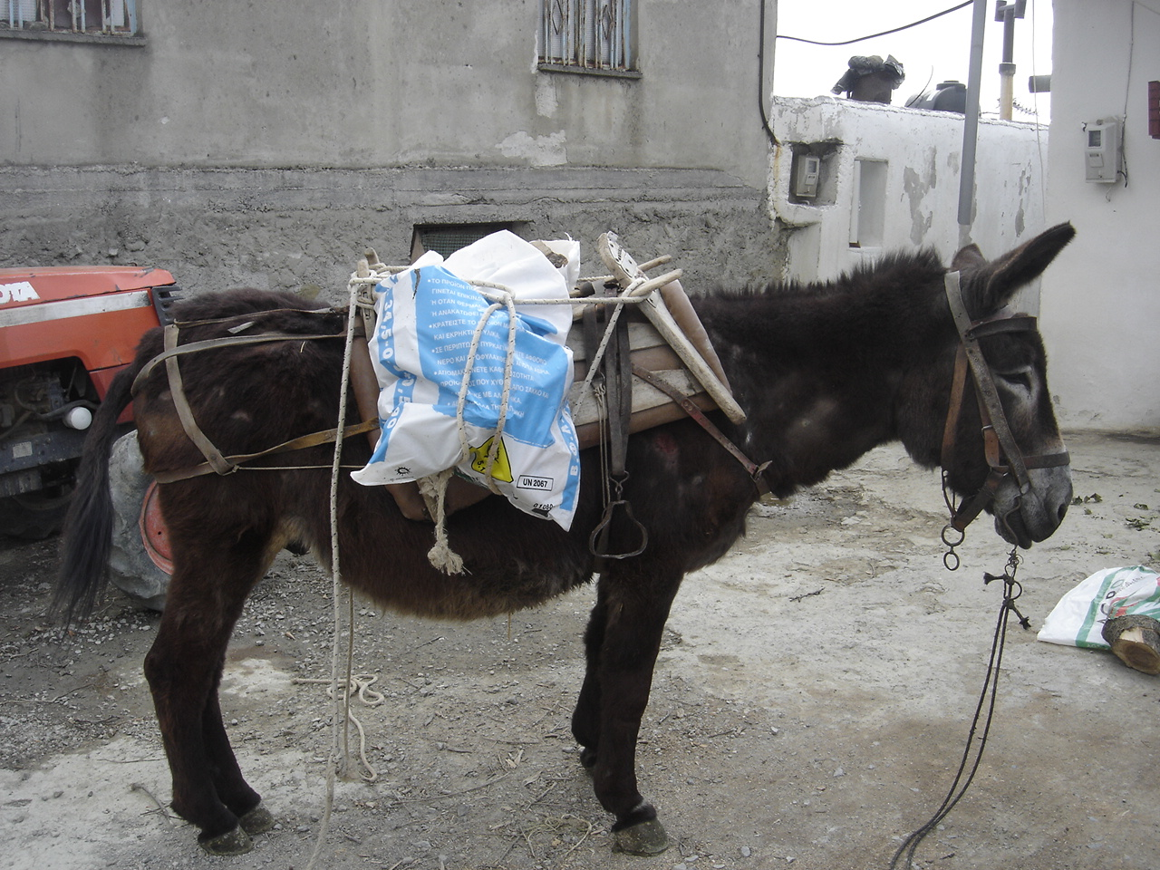 Α donkey in Messi, Viannos.